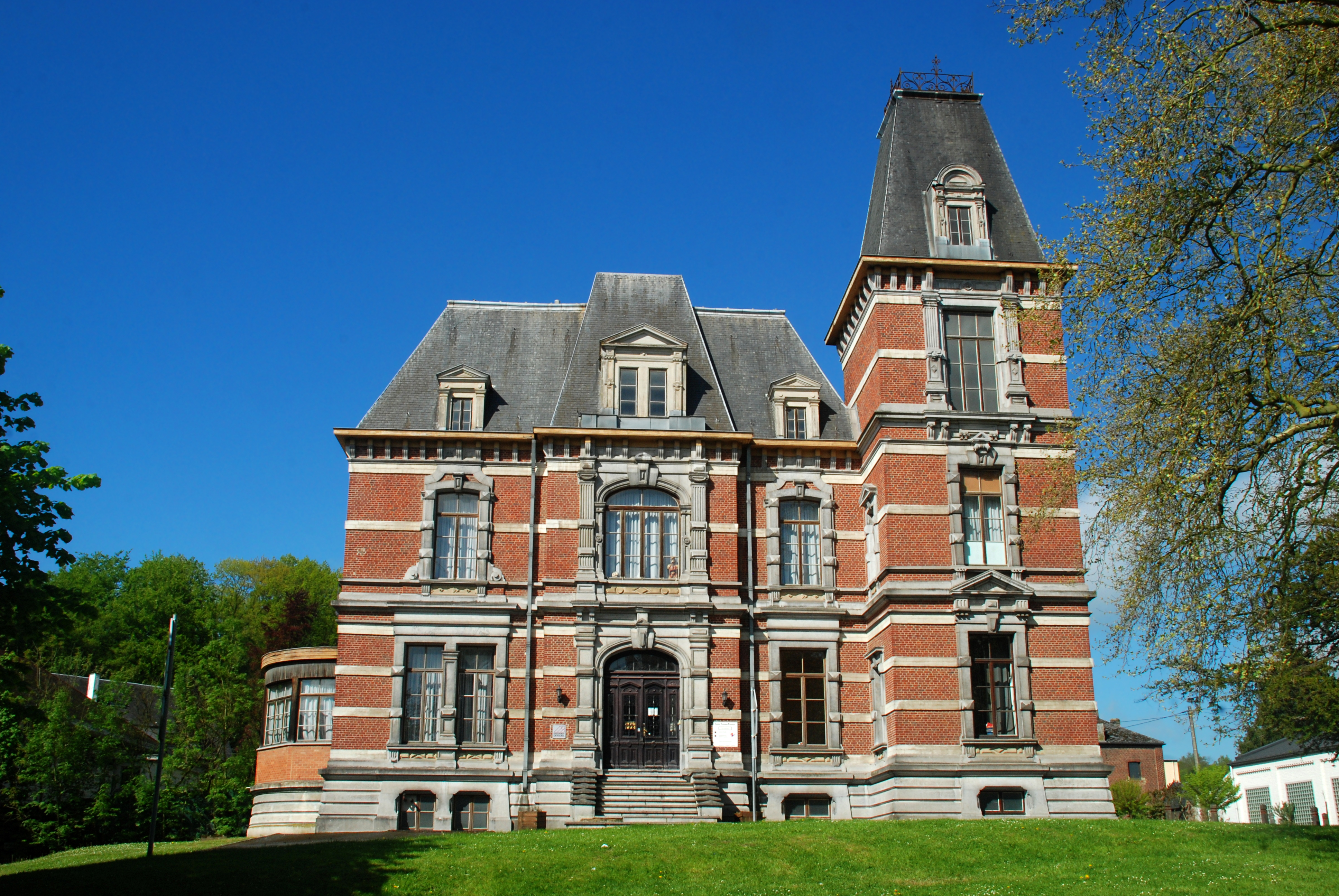 Belgique - Brabant wallon - Court-Saint-Étienne - Château de Wisterzée